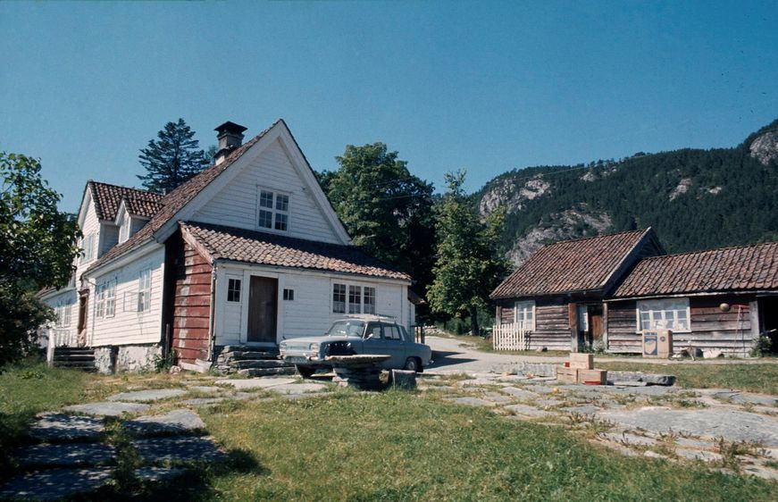 Alværn i Lavik. Foto: Per Jahn Lavik. Fra Riksantikvarens Kulturminnesøk.